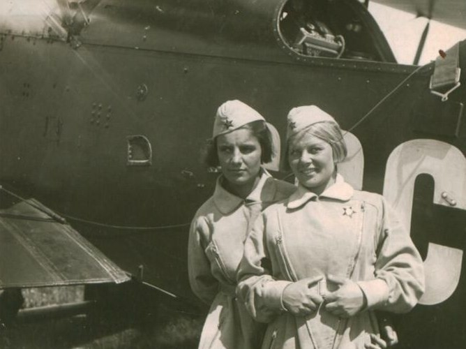 Галина Пясецкая (1915—2007) и Ната Бабушкина (1915—1936) у самолета с парашютами перед прыжком из самолета.